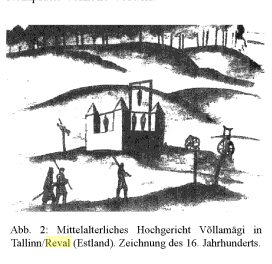 Tallinna Võllamägi, gravüür